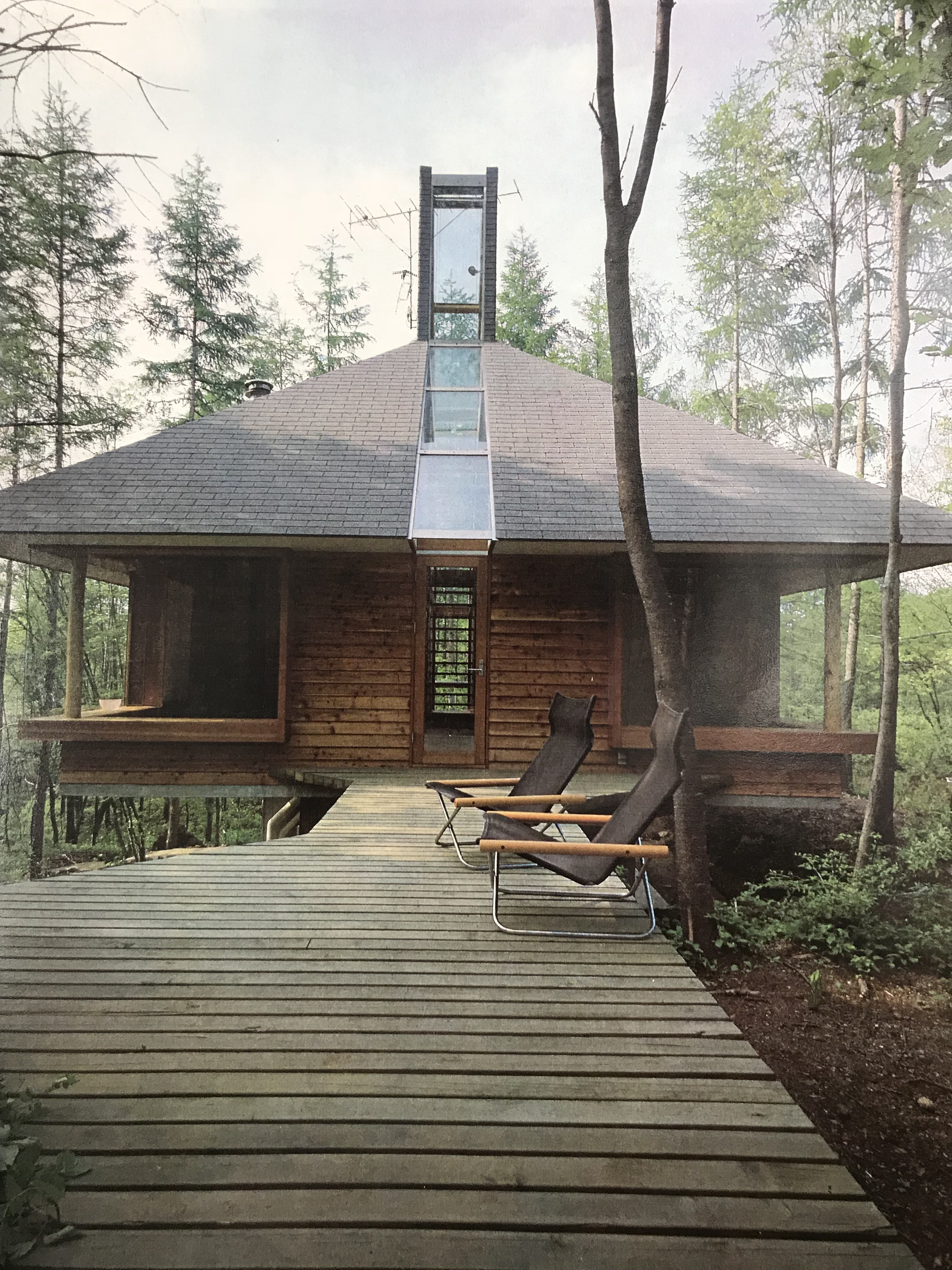 テラスより嬬恋居を見る